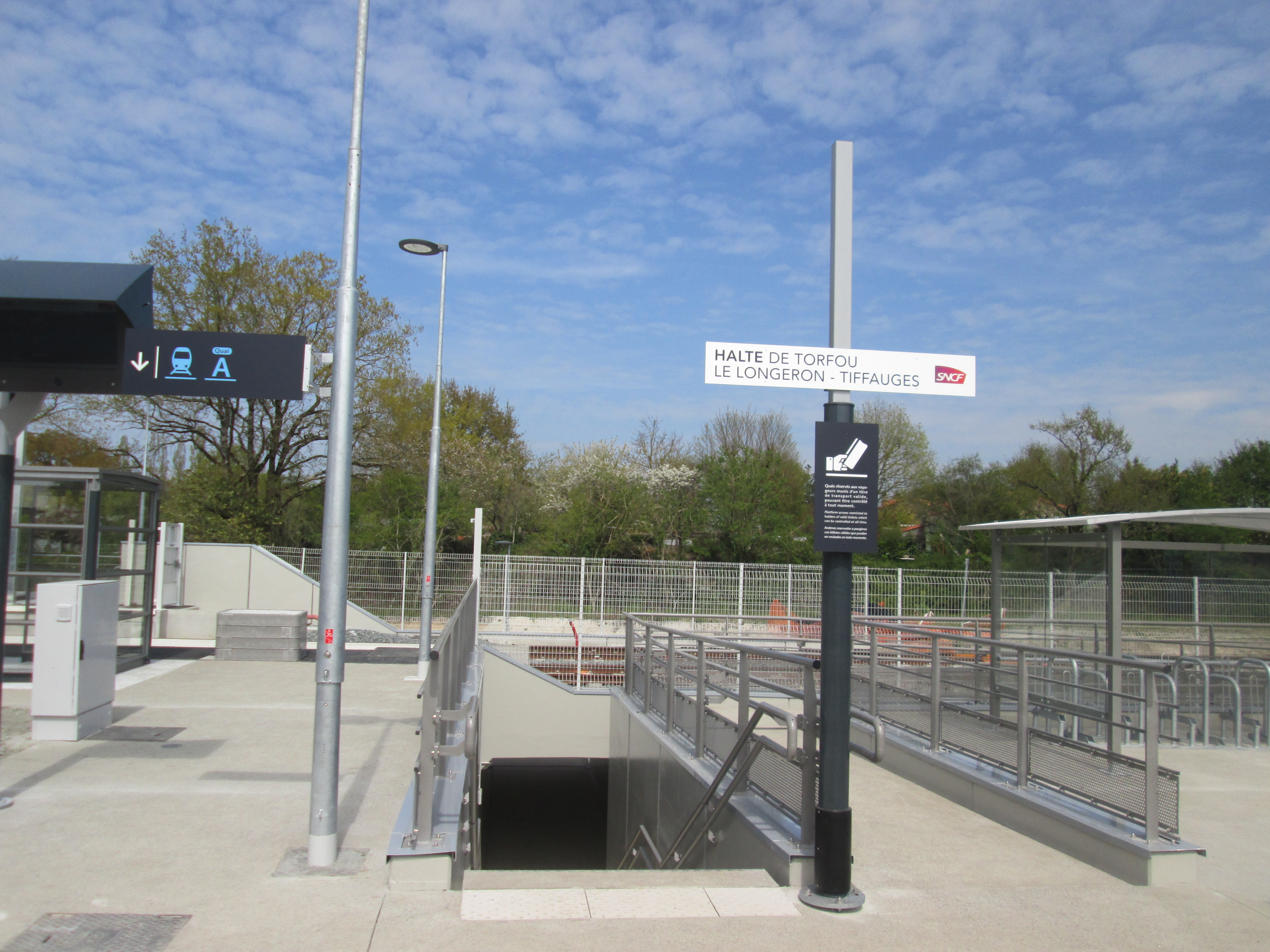 Entrée de la halte de Torfou - Le Longeron - Tiffauges, vue côté route de Clisson.